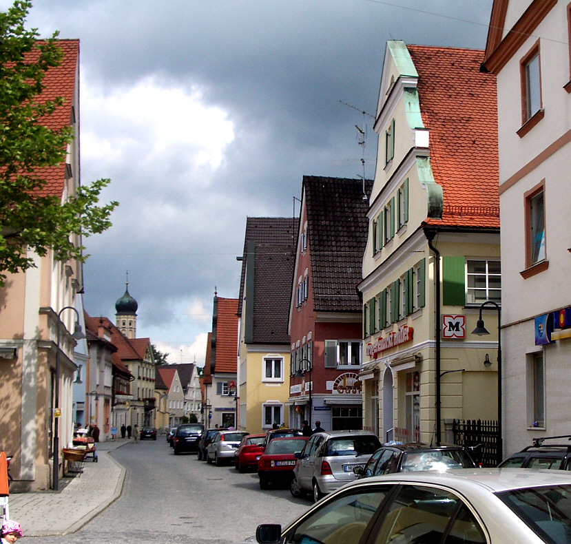 Weißenhorn, Landkreis Neu-Ulm, Bayern: Blick vom Kirchplatz in die Hauptstraße, Richtung Heilig-Geist-Kirche